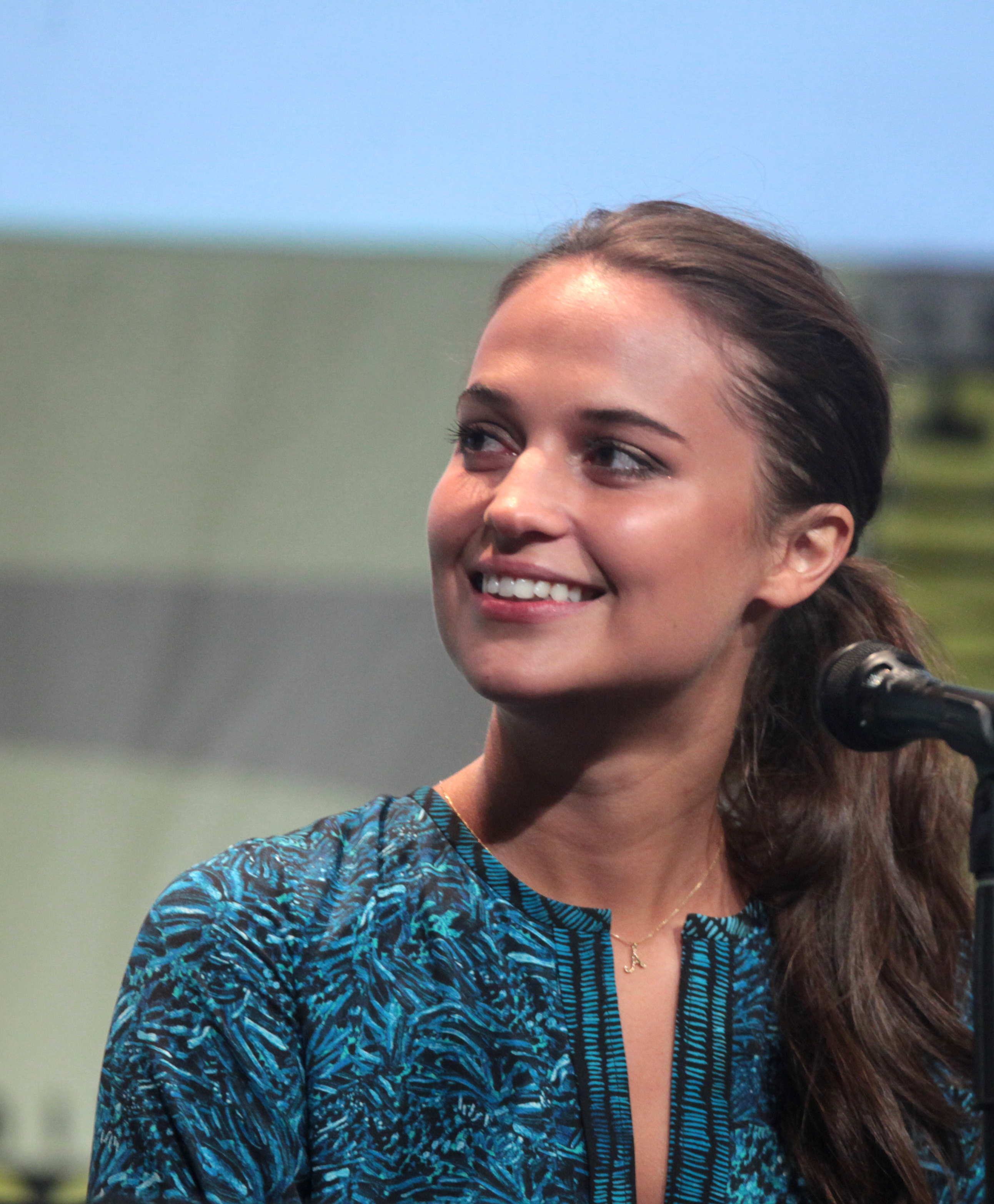 Alicia Vikander em 2015, no San Diego Comic Con International, representando "The Man from U.N.C.L.E.", no San Diego Convention Center em San Diego, Califórnia.